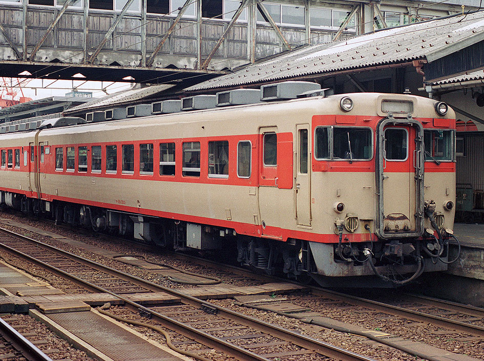 国鉄キハ28 3001